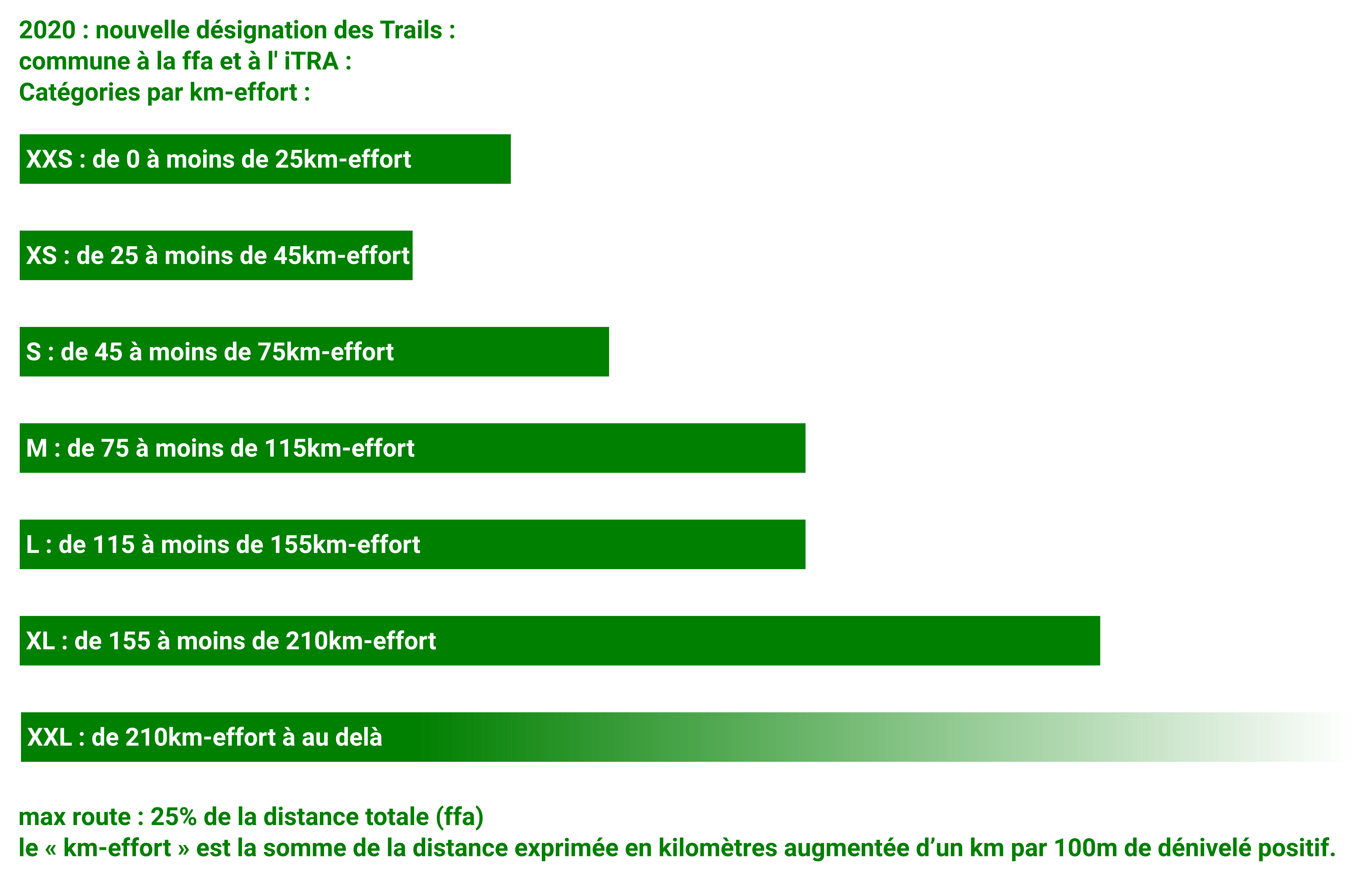 Nouvelles appellations (pour la ffa) qui s'aligne sur celle de l'iTRA (2020) avec sa notion de km-effort)